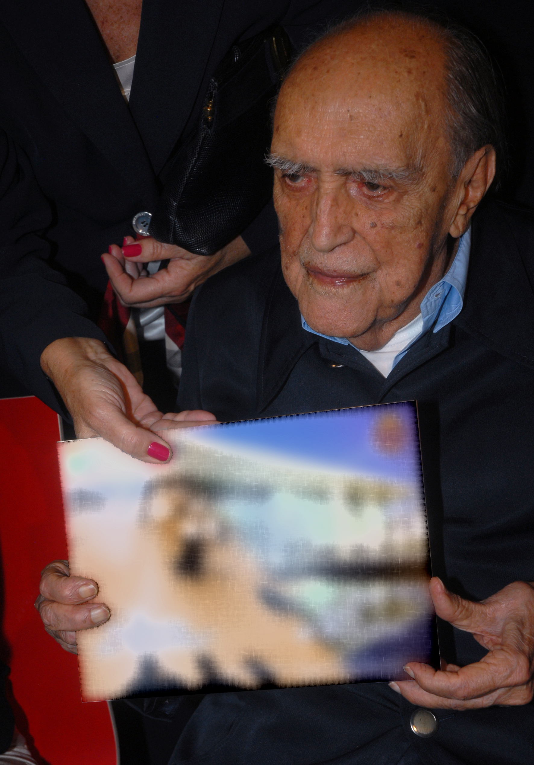 Brasília - O arquiteto Óscar Niemeyer, responsável pelo projeto, durante cerimônia de inauguração da Biblioteca Nacional de Brasília.